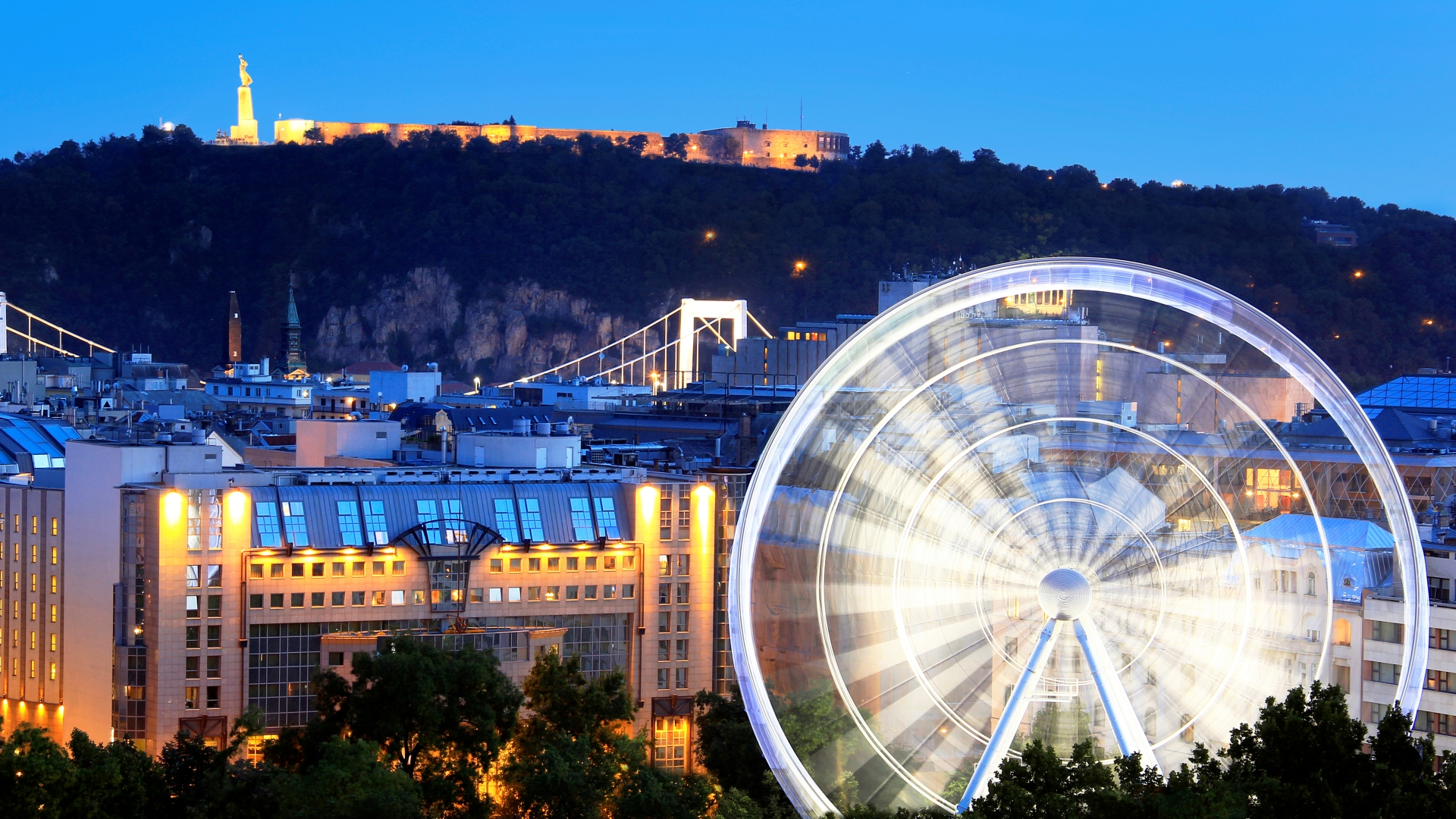 Kempinski Hotel Corvinus Budapest